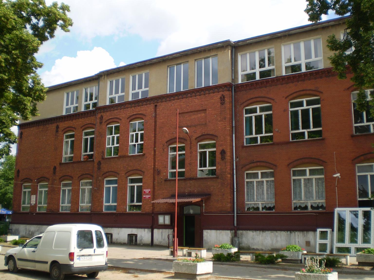 Gubin, ul. Świerczewskiego 1 - Szkoła Podstawowa nr 2